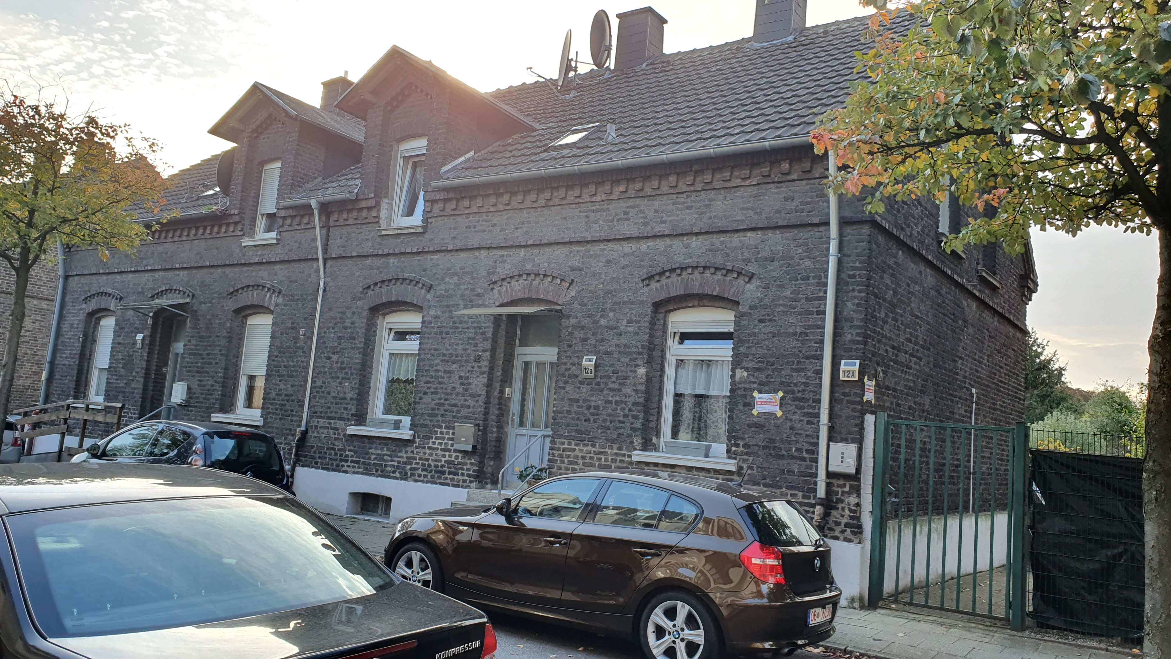 Haus in Styrum